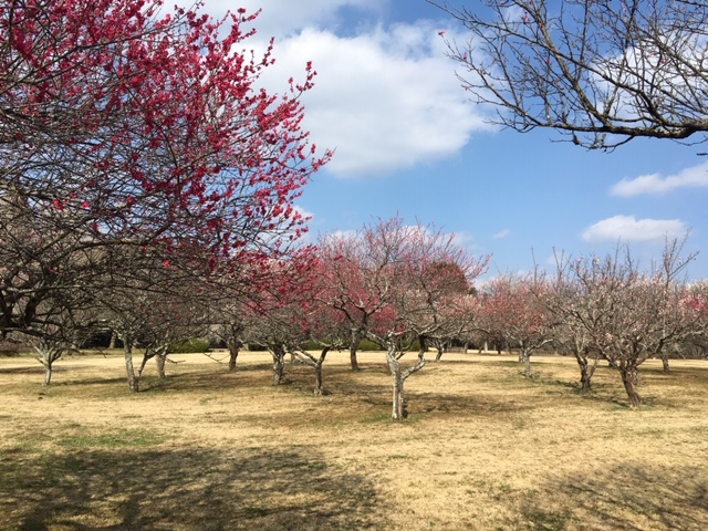 千葉市昭和の森公園内の梅林。2019年3月5日、梅林内の芝生から撮影。